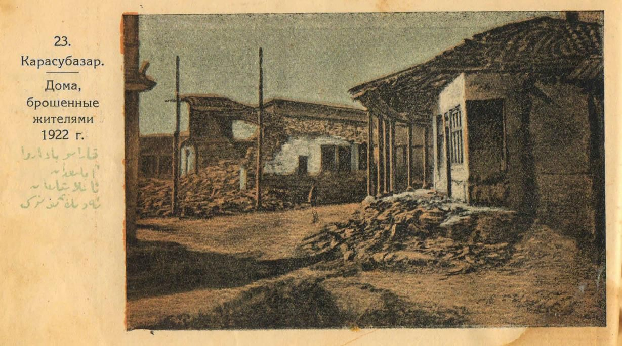 Присоединение Крымского ханства Российской империей обернулась трагедией для крымских татар, которые были вынуждены покидать свои дома и эмигрировать в Османскую империю. Всего к началу 20 века Крым и Северное Причерноморье, а также другие территории ханства покинуло более миллиона человека